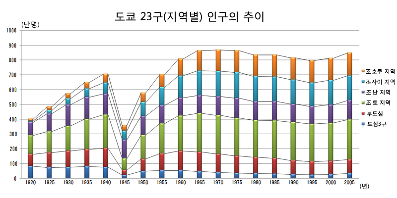 도쿄23구(지역별) 인구의 추이